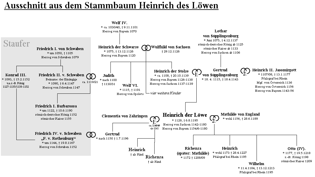 Ausschnitt aus dem Stammbaum Heinrich des Löwen